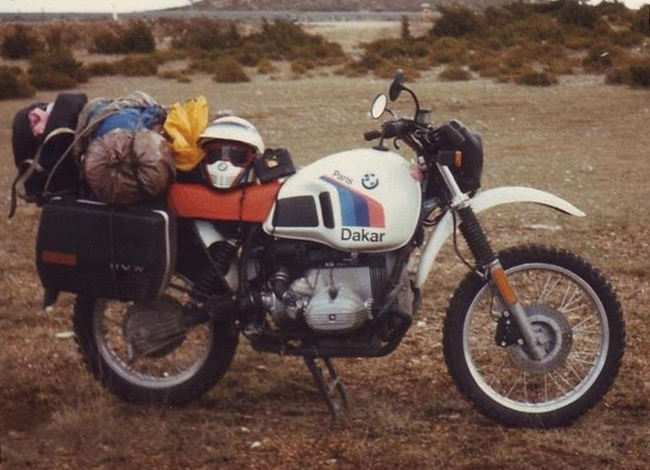 G/S de Mimine. Merci.